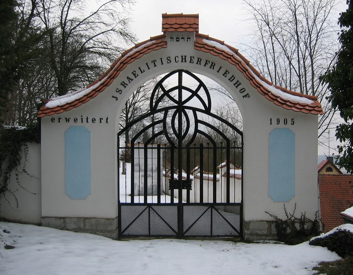 Eingangstor zum jüdischen Friedhof in Sulzbürg, Gemeinde Mühlhausen, Landkreis Neumarkt/Opf. von 1905 ת ר ס ה unter dem Giebeldach gibt das Baujahr des Tores in hebräischen Zahlen nach der kleinen Zählung an: 5 + 40 + 200 + 400 = 665 + 1240 = 1905 (eigentlich 1904/05)